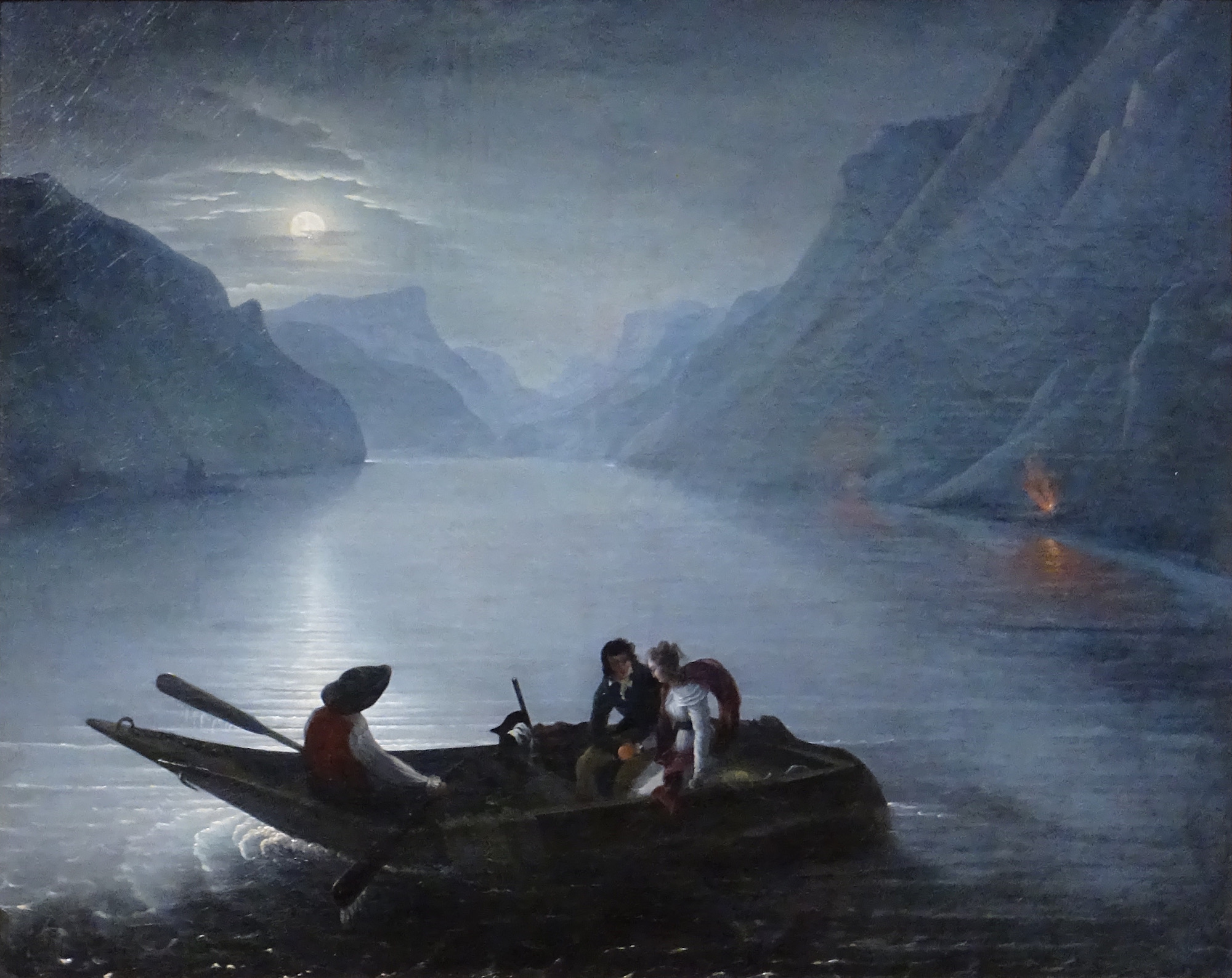 Huile sur toile - 127 x 160 cm Montmorency, Musée Jean-Jacques Rousseau Photo : Didier Rykner